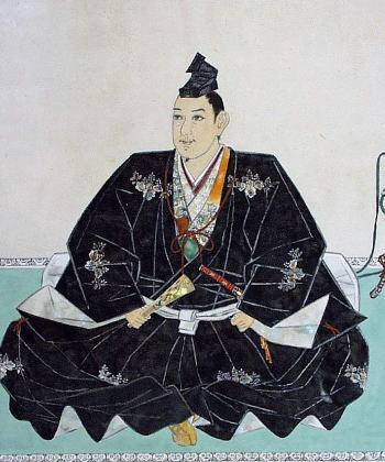 宇喜多秀家(Ukita Hideie)